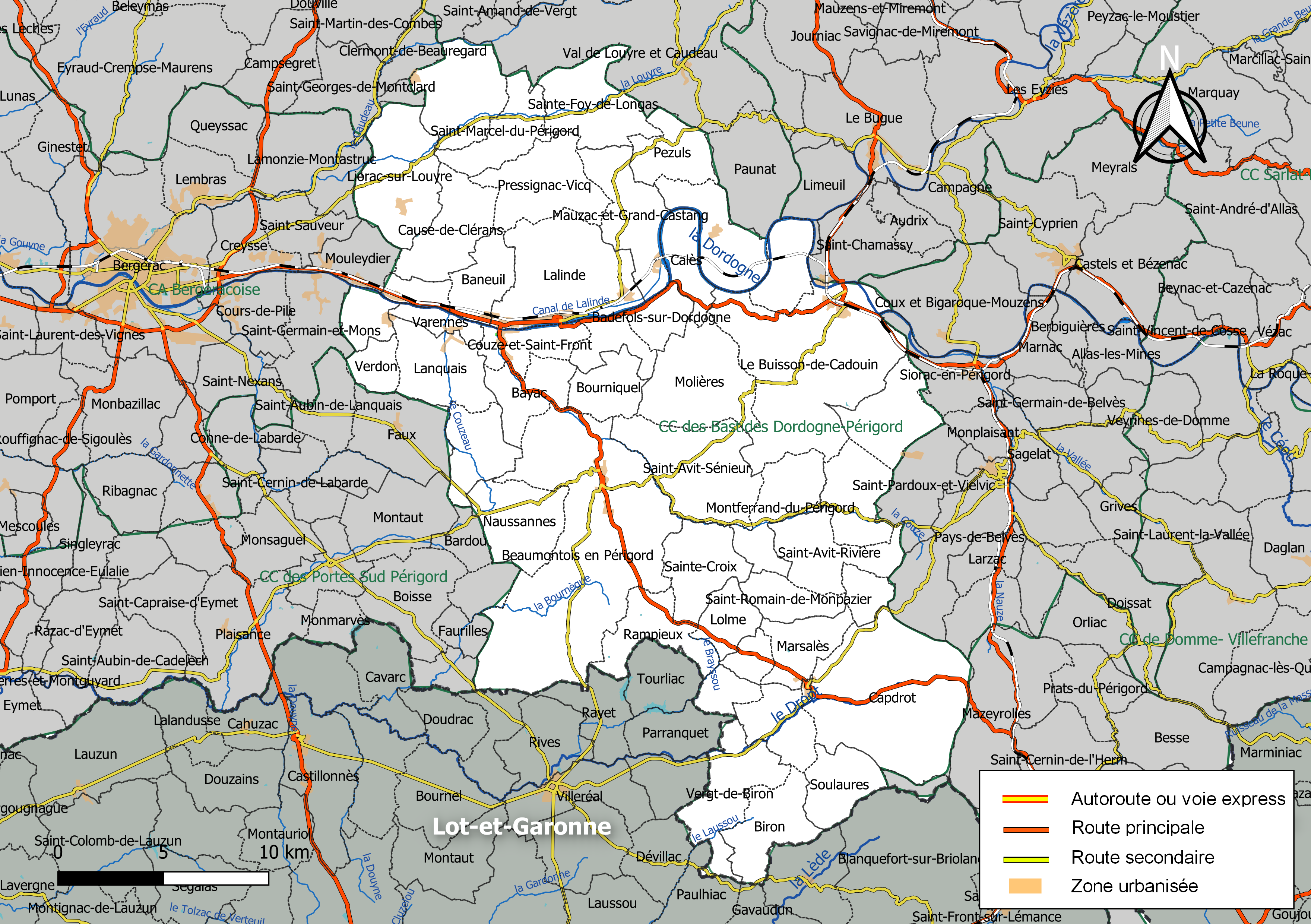 Carte géographique de la Communauté de communes des Bastides Dordogne-Périgord, département de la Dordogne, France. Composition au 1er janvier 2019.